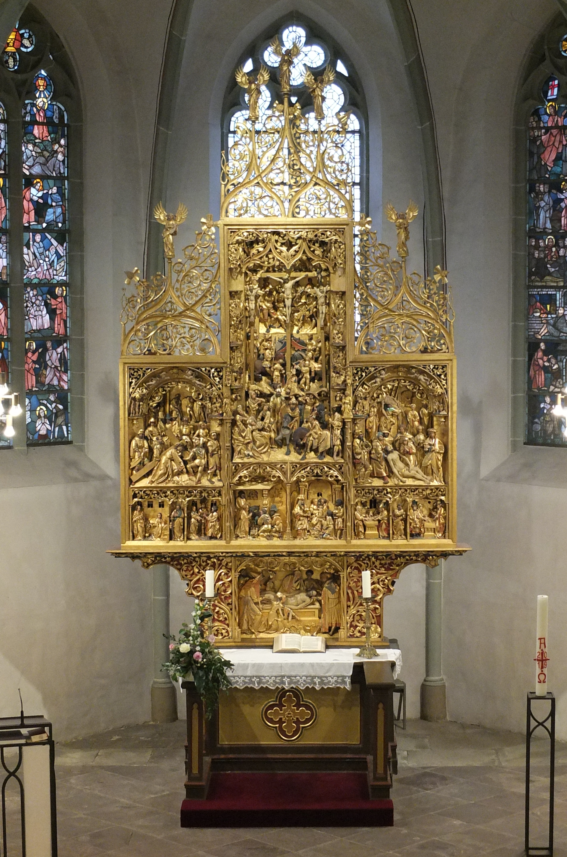 Ein um 1525 geschnitzter Altarretabel mit Darstellungen aus dem Leben Christi und der Passion, zu sehen in der Evangelischen Kirche Lünern.